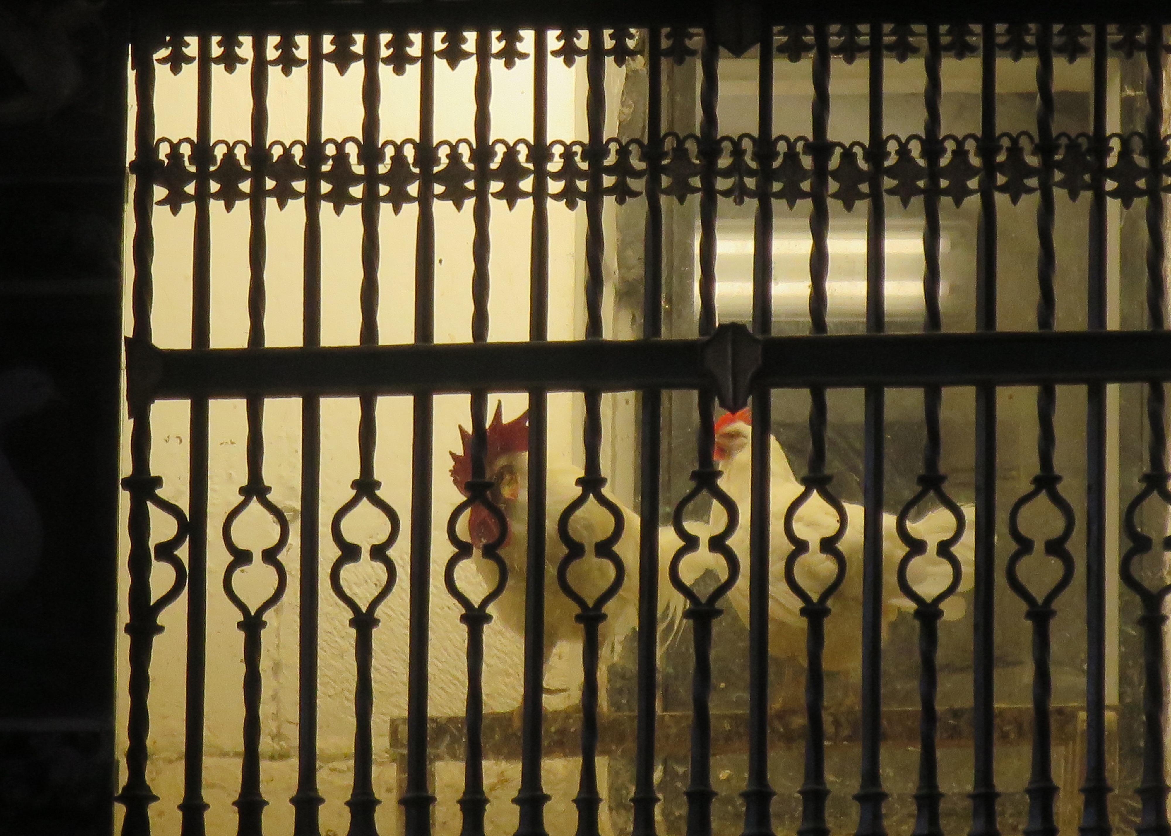 Hühner in der Kathedrale Santo Domingo de la Calzada